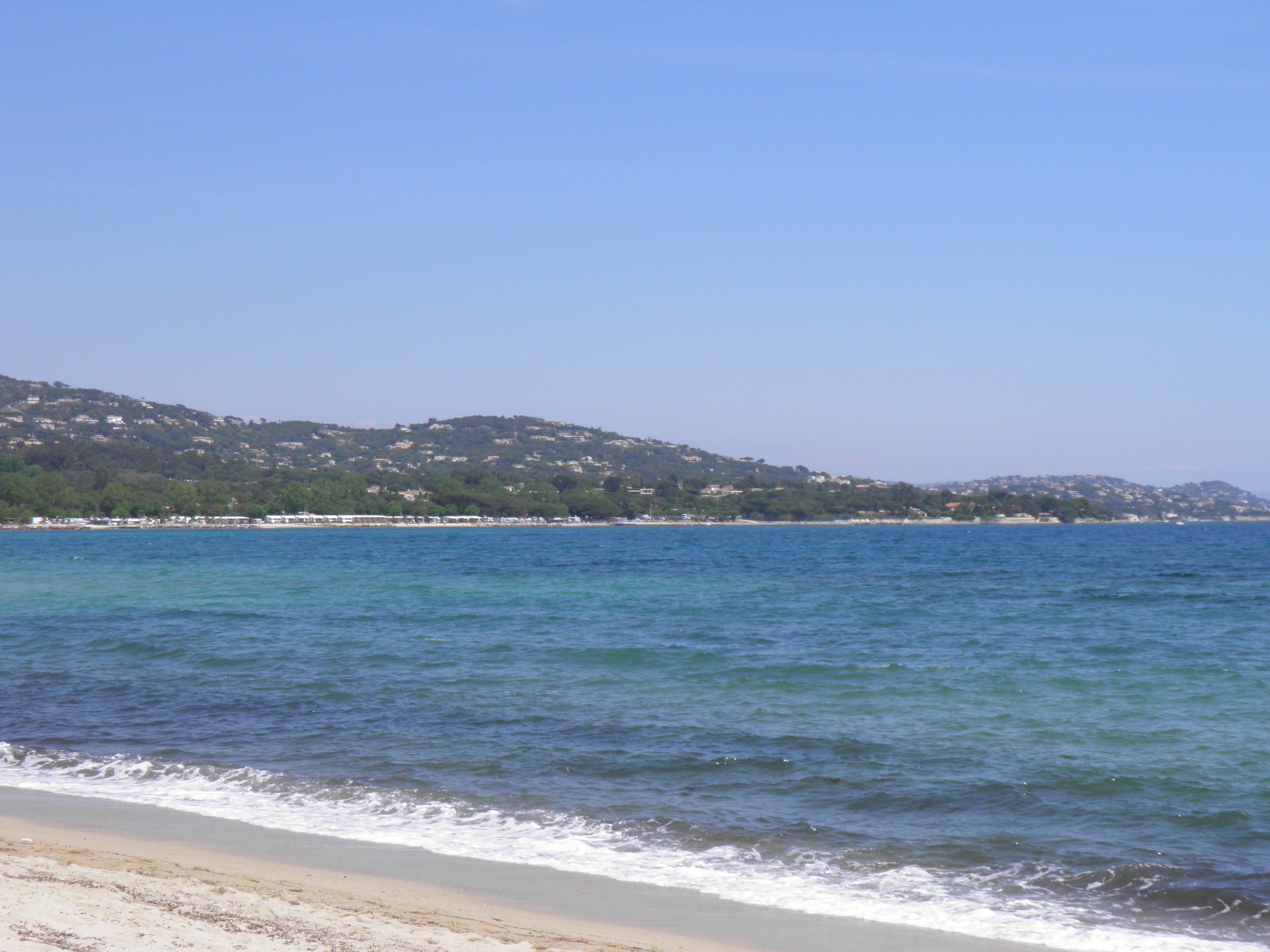 Plage à Port Grimaud (Var, France).